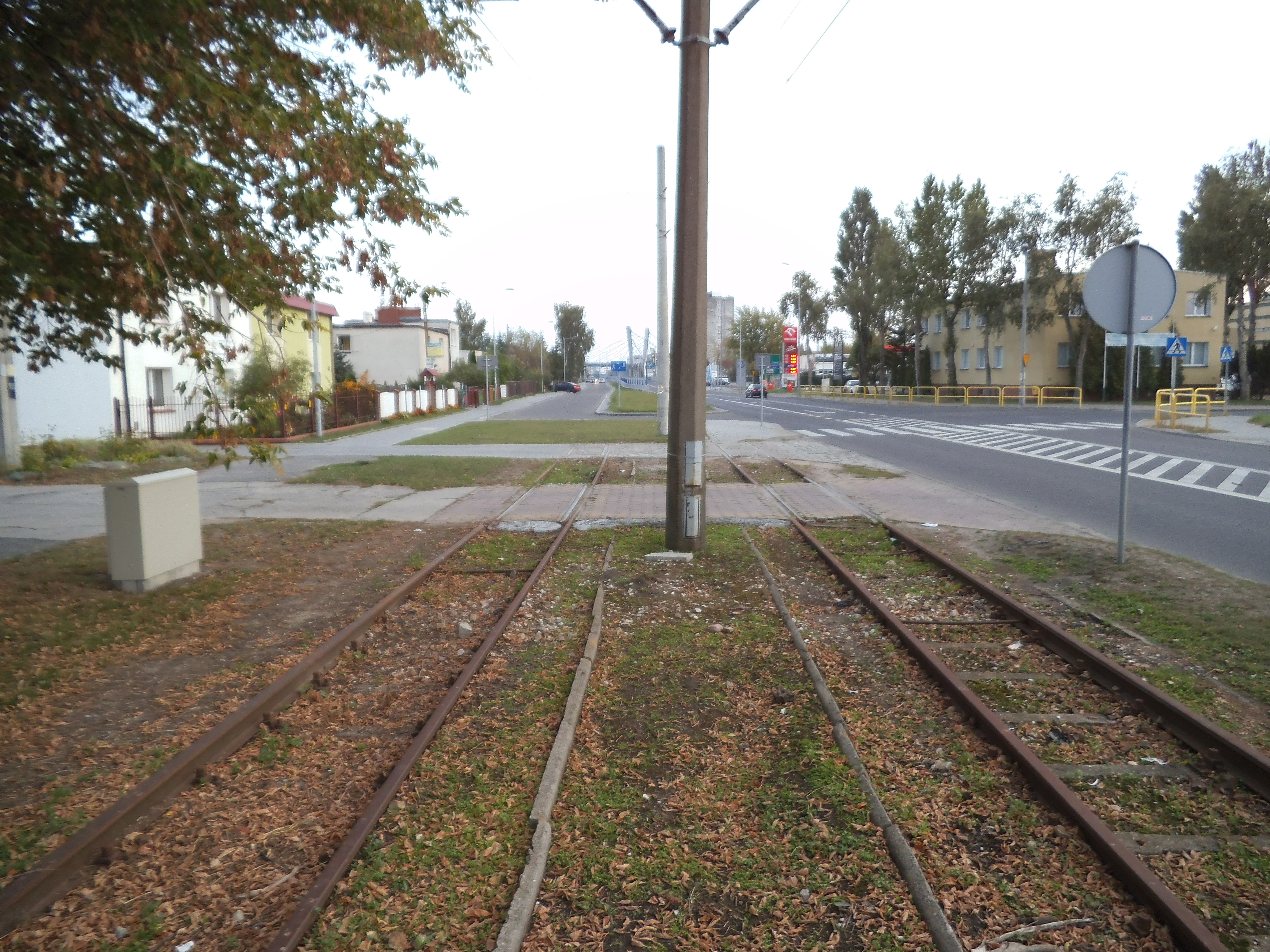 Zlikwidowane torowisko tramwajowe przy ulicy Wschodniej w Toruniu